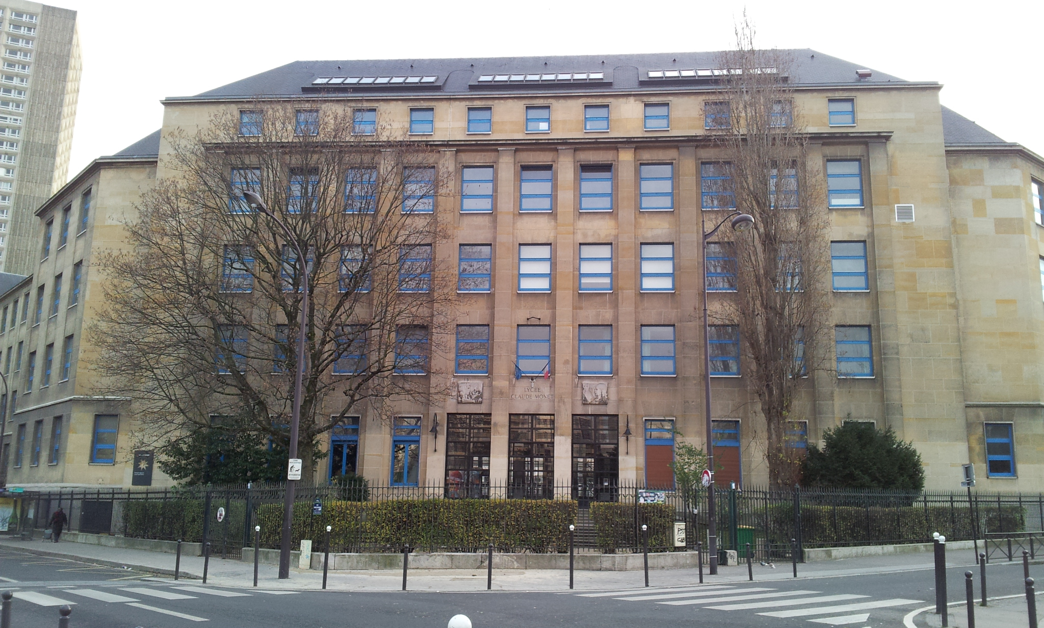 Paris 13e arrondissement - Lycée Claude-Monet - façade, vue depuis la rue Charles-Moureu